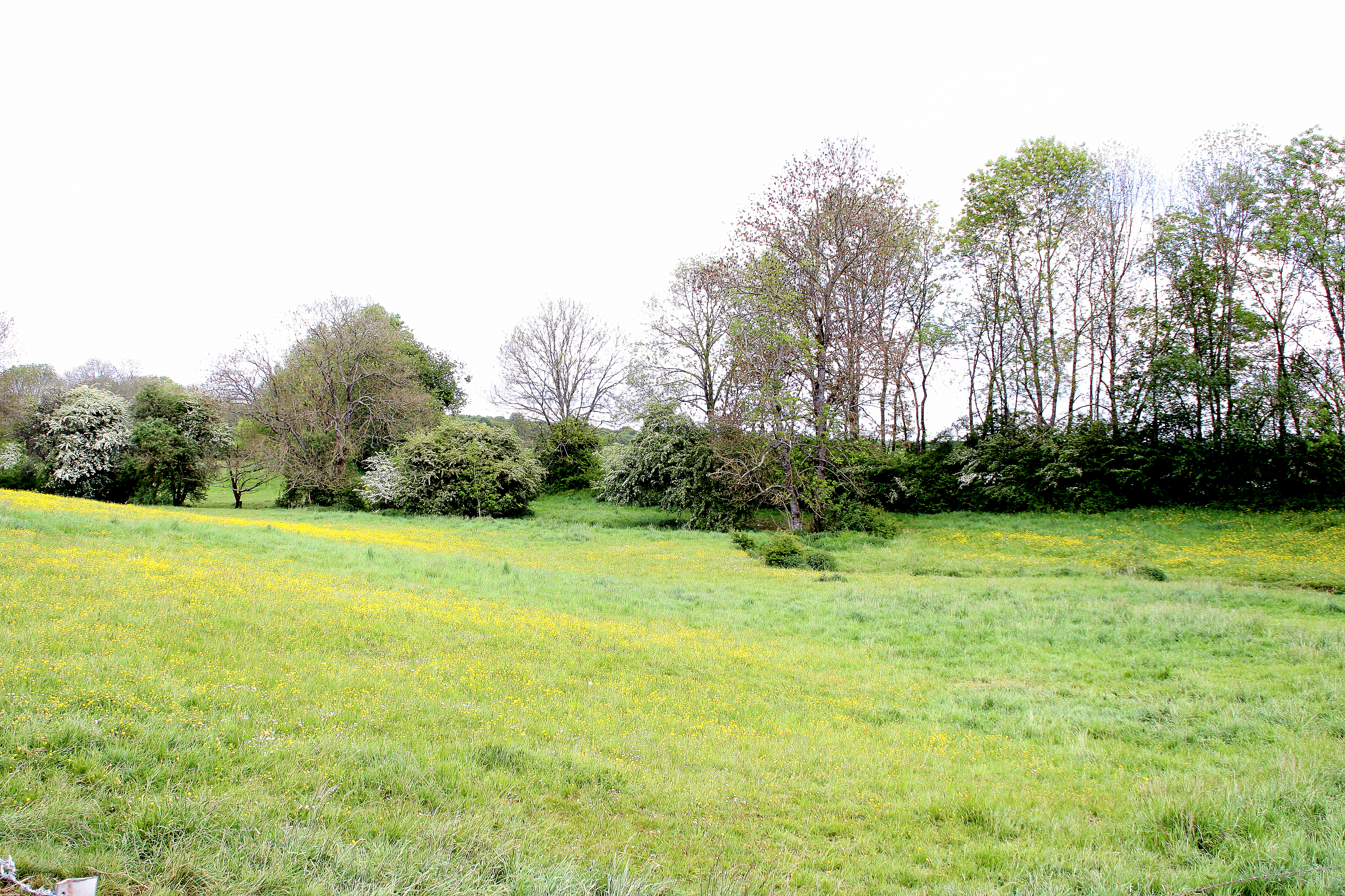 De Conroy südlech vun der Ferme du Moulin de Moyeuvre